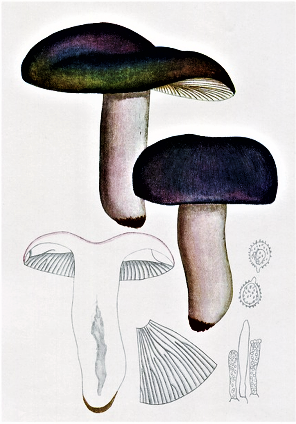 Giacomo Bresadola: Russula cyanoxantha (Schaeff., 1774) Elias Magnus Fries, 1863)